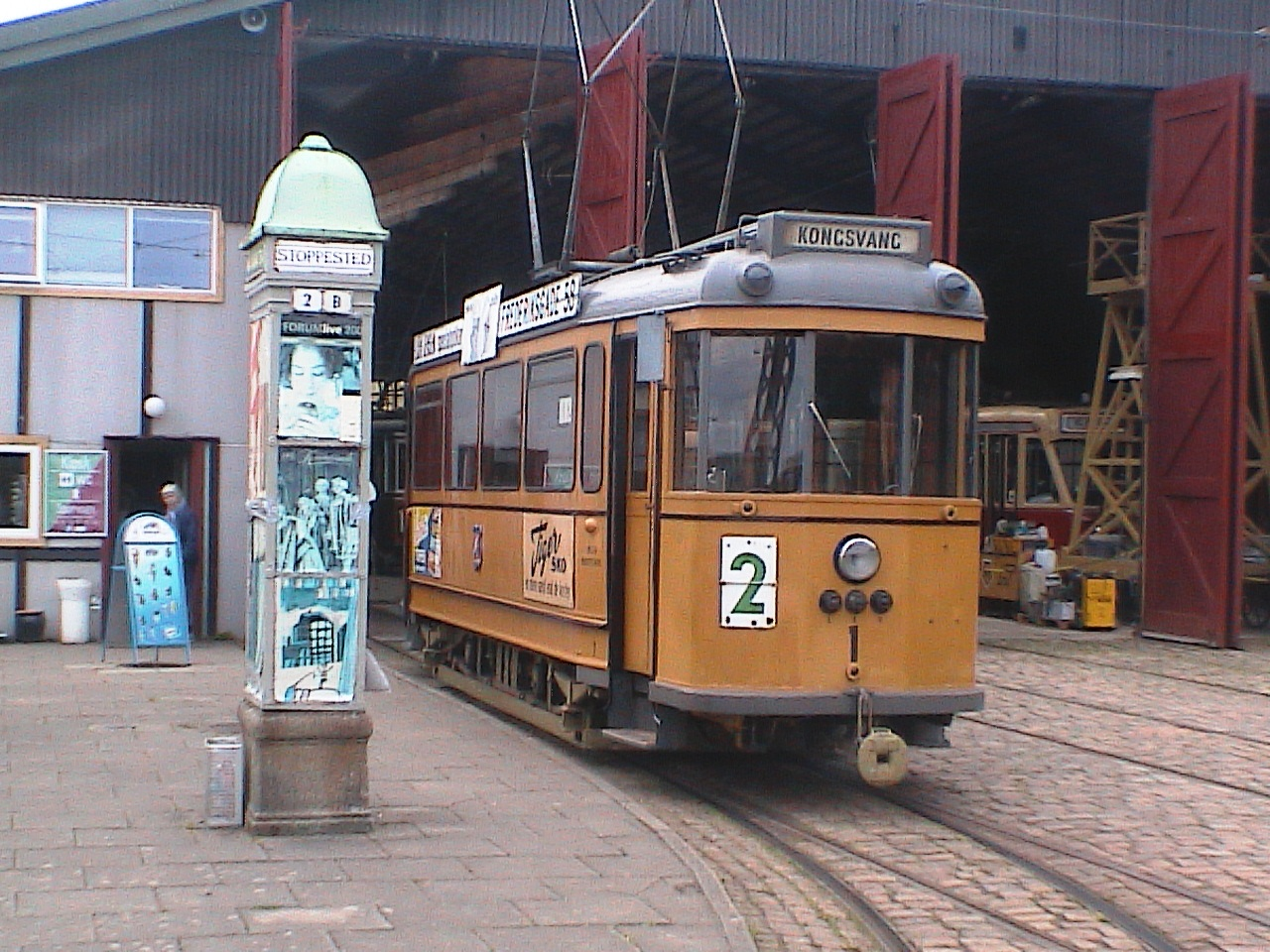 Wagen Nr. 1 der Århuser Straßenbahn im Museum Skjoldenæsholm.